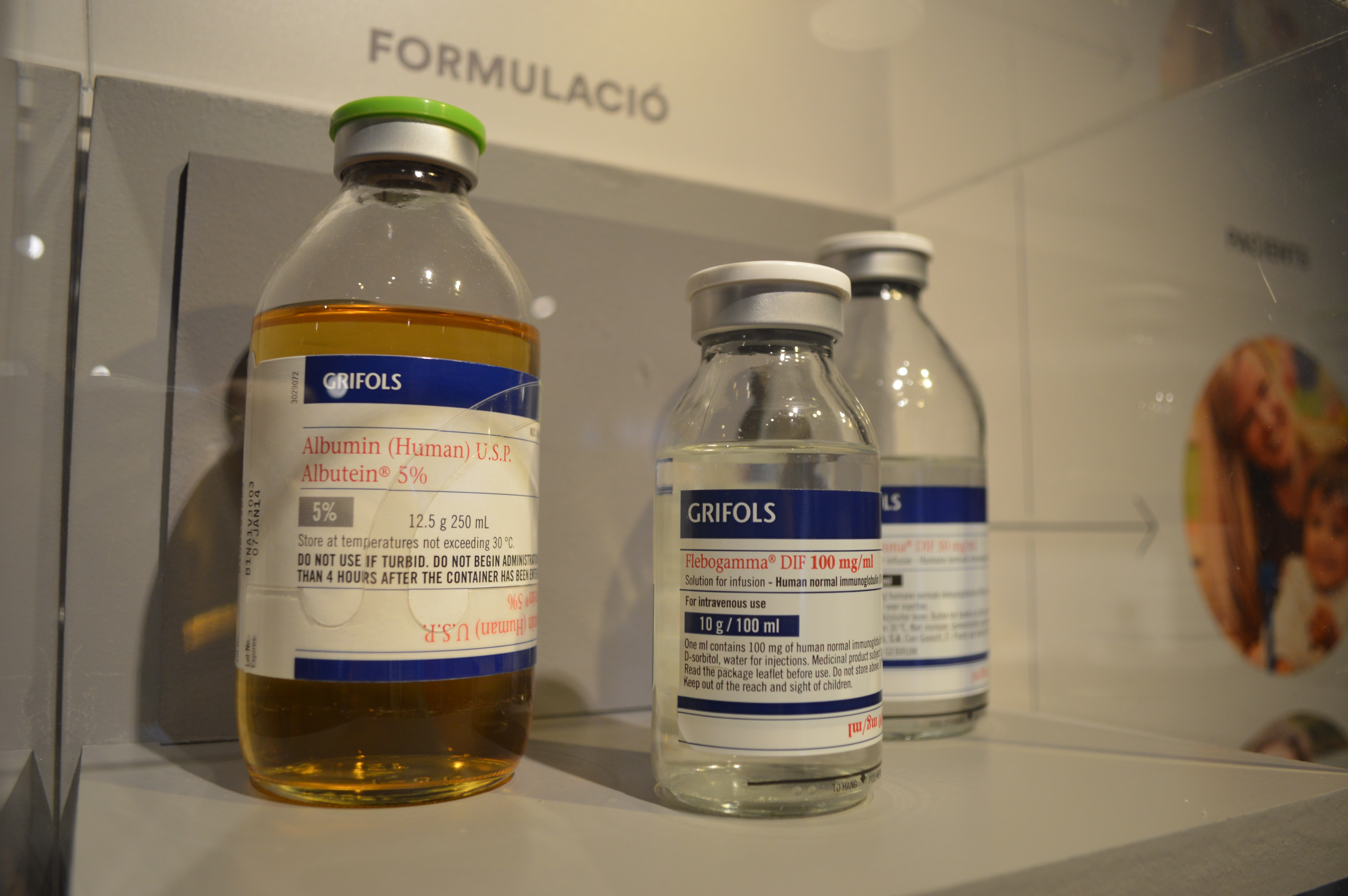 Flascons de diferents productes Grifols.